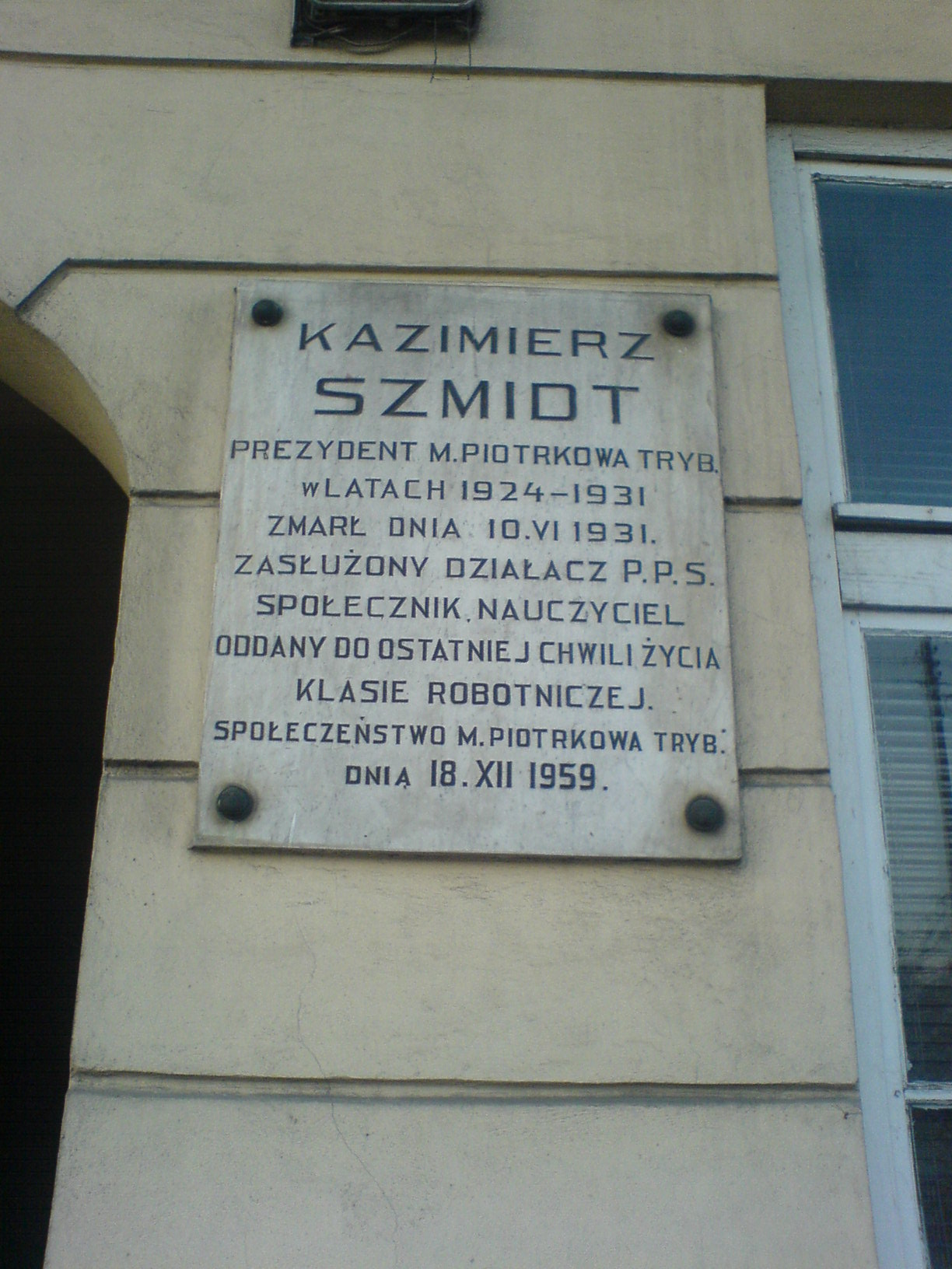 Tablica upamiętniająca przedwojennego prezydenta Piotrkowa Trybunalskiego, działacza PPS, Kazimierza Szmidta.